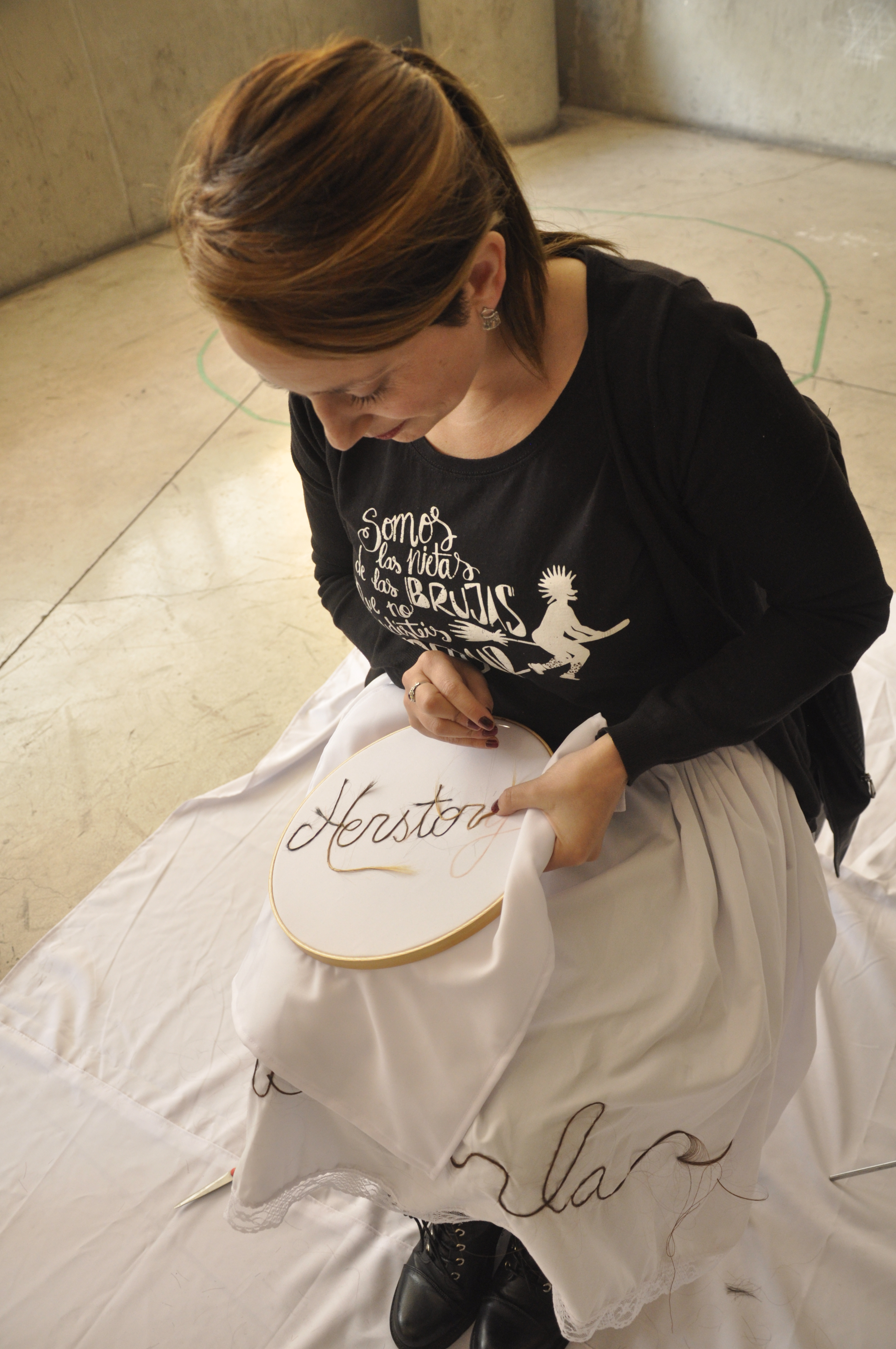 Marla Freire "Tejidos de filiación y tiempo: herstory"